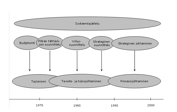 Johtamisoppien kuvaus